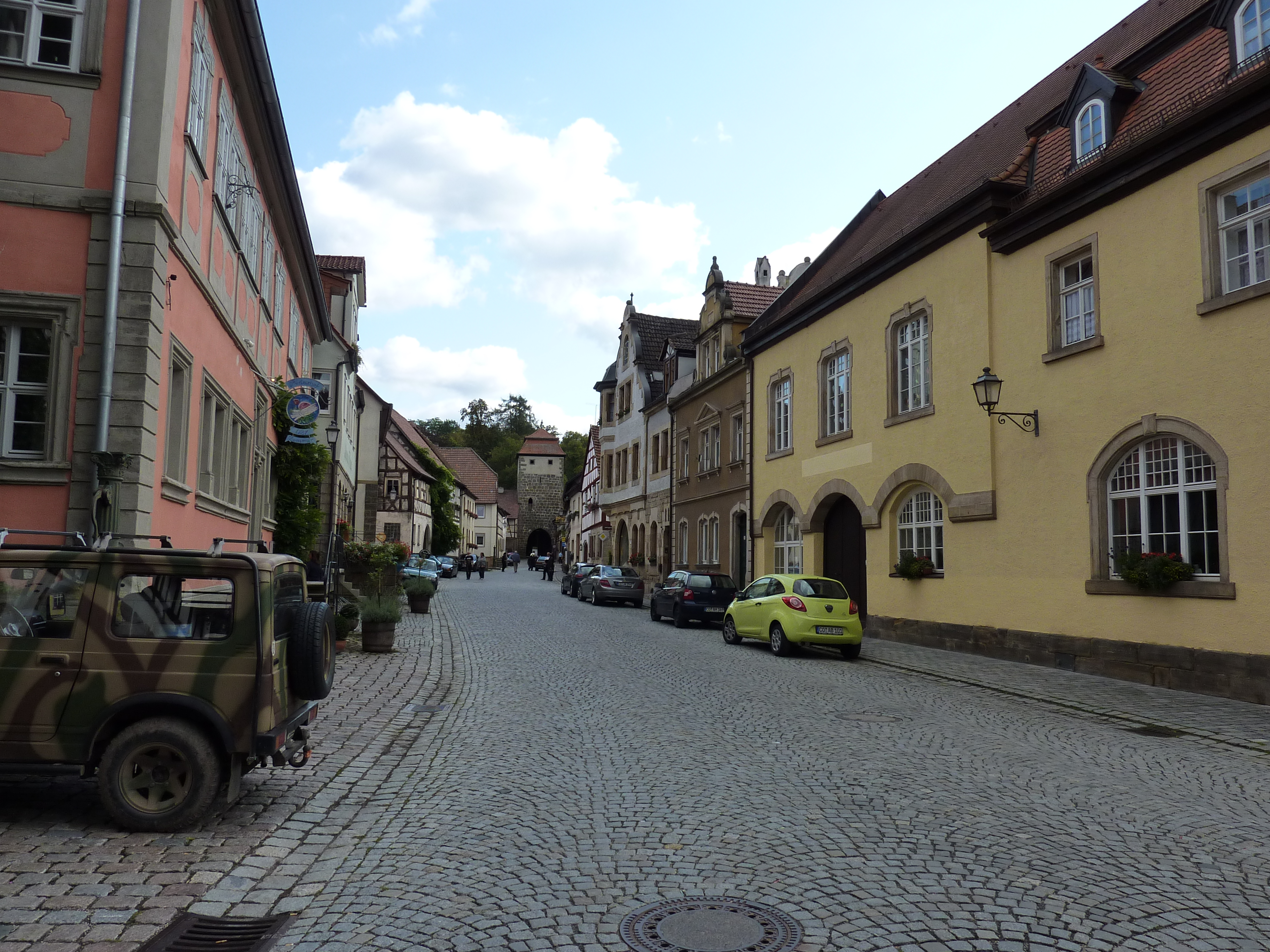 Straße und Turm in Seßlach